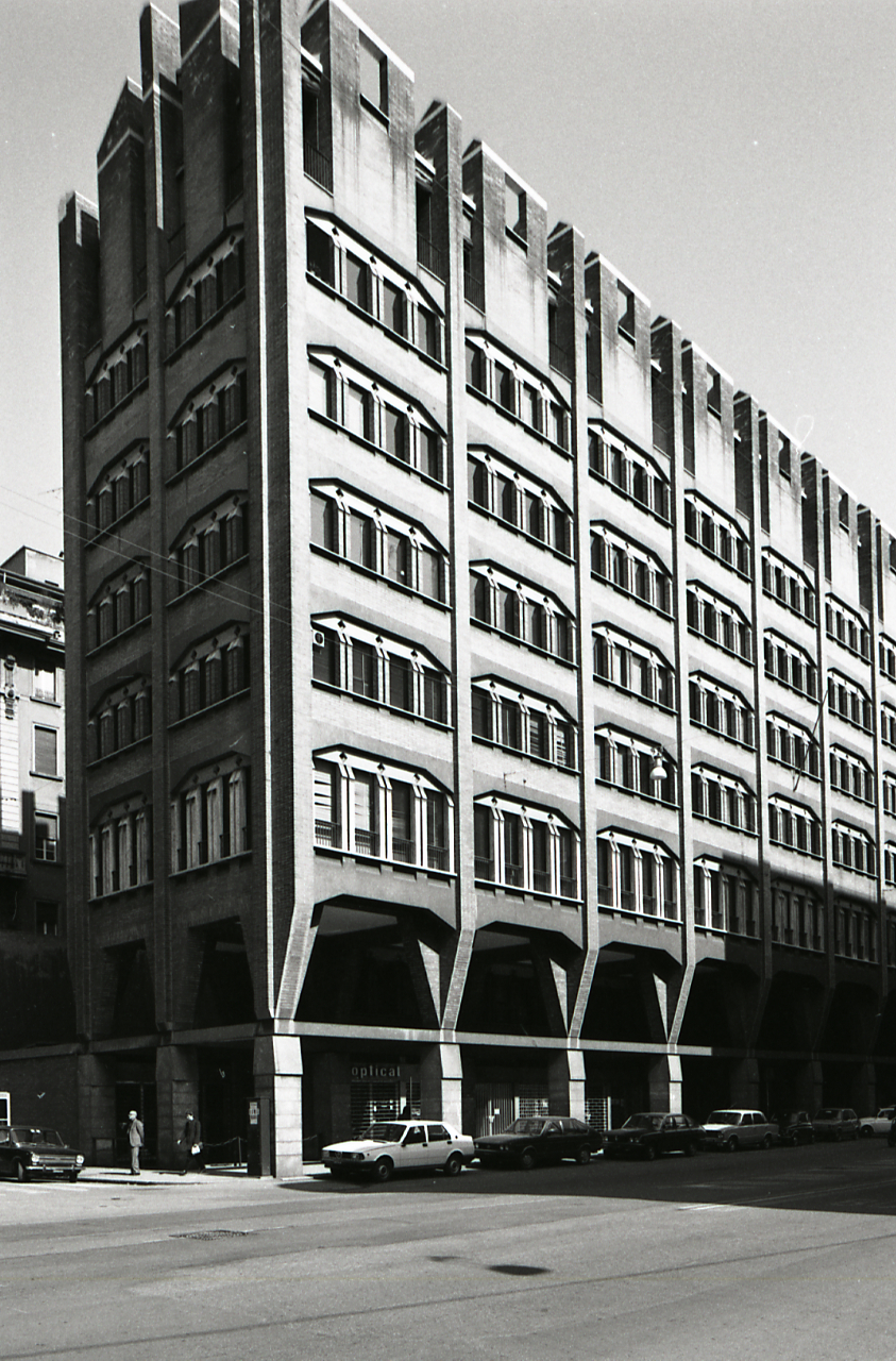 Template:Palazzo ex ENPAS, ora INPDAP. Via dei Mille (angolo via Montebello), Bologna. Architetto Saverio Muratori. Servizio fotografico : Parma, 1982 / Paolo Monti. - Strisce: 7, Fotogrammi complessivi: 37 : Negativo b/n, gelatina bromuro d'argento/ pellicola ; 35 mm. - ((Sul portanegativi: N[I]K[MA]T-EL FP4. - Occasione: Documentazione per la pubblicazione: Fleming John, Honour Hugh, Pevsner Nikolaus, Dizionario d'architettura, Torino, Einaudi, 1981. - Fonte: Agenda di Paolo Monti: Nikon Leika 3001-/ Monti 1978 (1978-1982), presso Archivio Paolo Monti. - Fonte: Fattura di Paolo Monti: IV. Commesse/ Fattura n. 38/ Fotografie di archivio per Dizionario di Architettura di Pevsner (1981/11/01), presso Archivio Paolo Monti. N. 40 foto formato 24x30. - Fonte: Monografia di Fleming John, Honour Hugh, Pevsner Nikolaus: Dizionario d'architettura, Torino, Einaudi (1981)